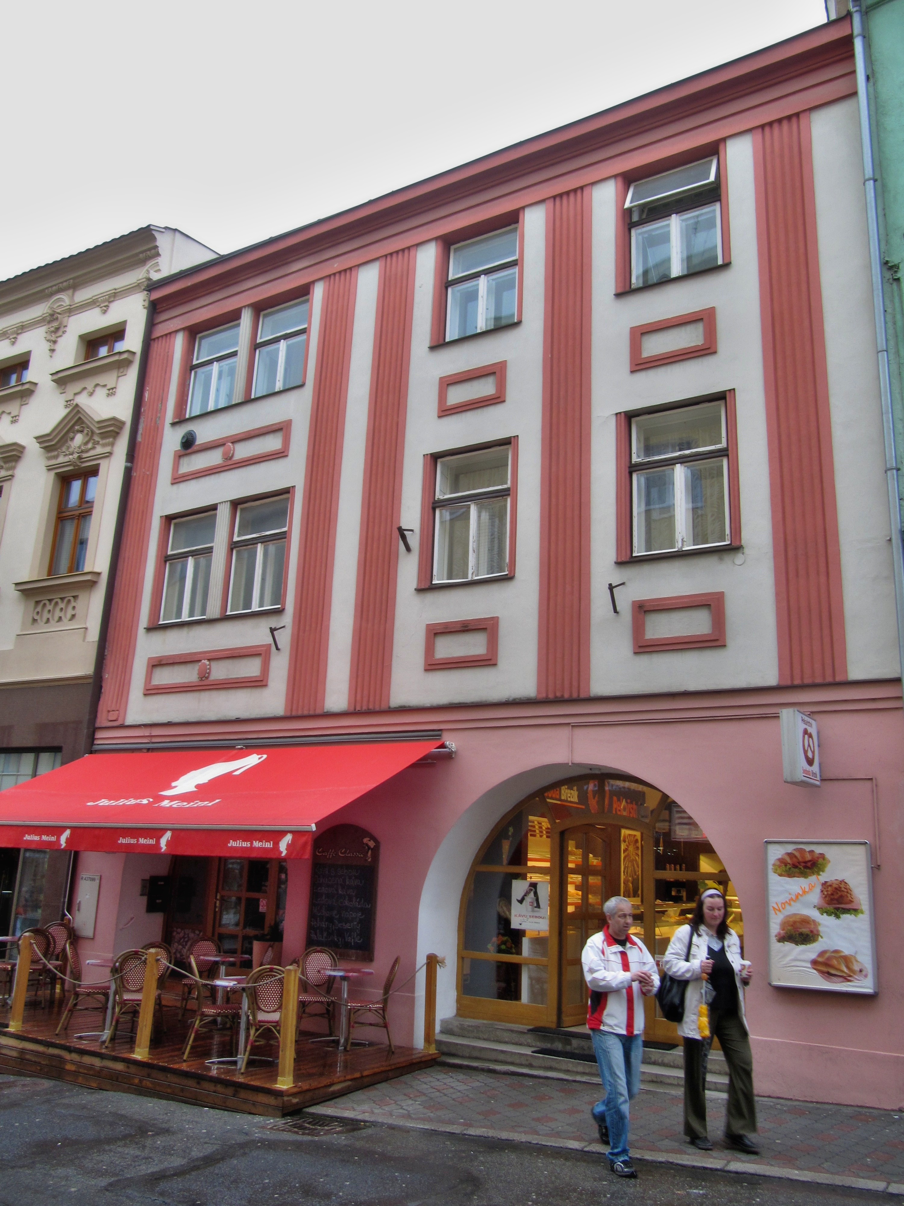 Měšťanský dům (Kroměříž), Vodní 92/20, Kroměříž